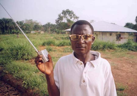 A radio listener in rural Kailahun Sierra Leone.